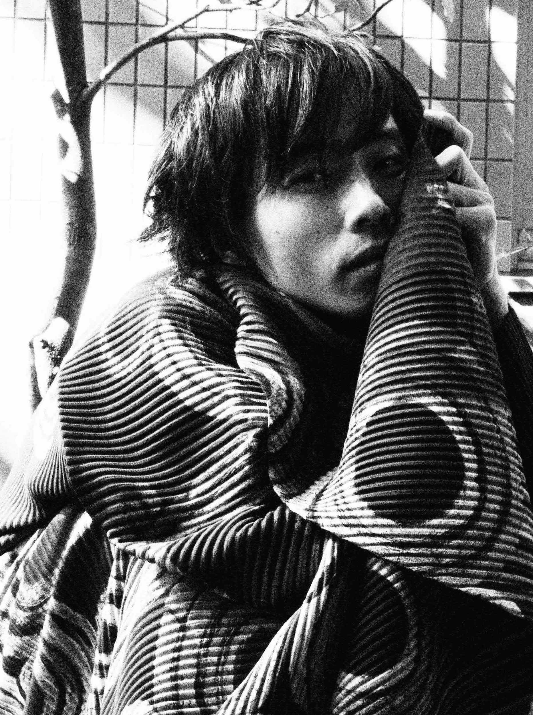 小木戸 利光